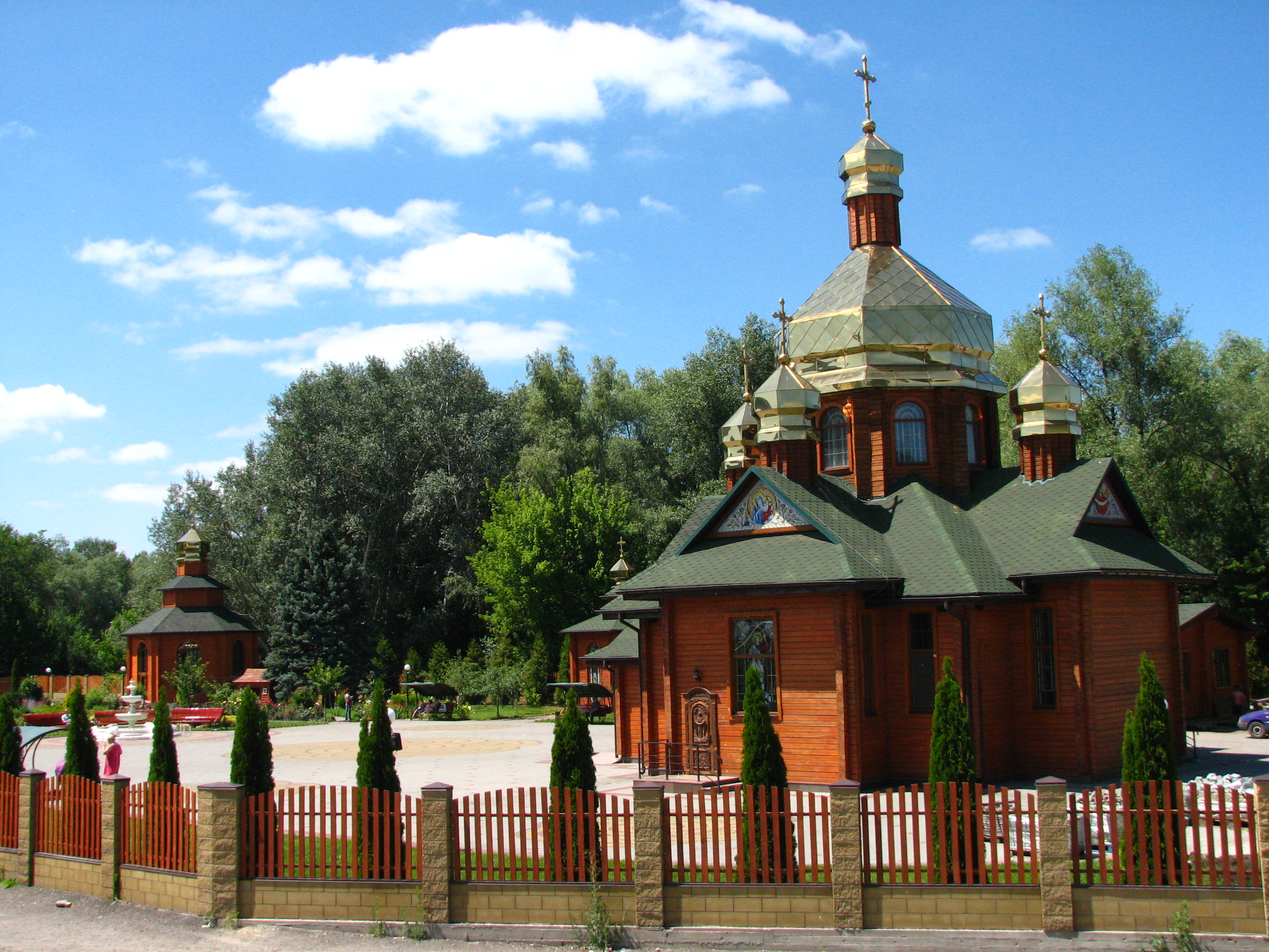 Церква на ж/м Червоному камні.